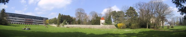 c'est un panorama du lycée Stephen Liegeard